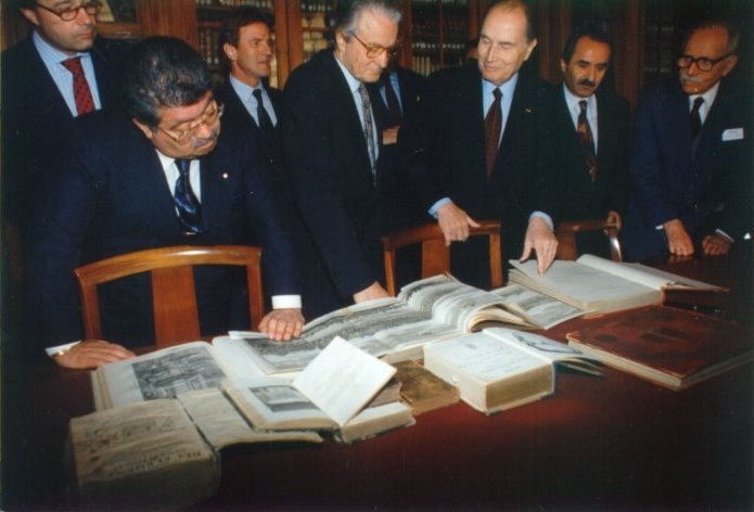 Turgut Ozal et Françoi Mitterand pandant la siganutre de l'accord bi laterale